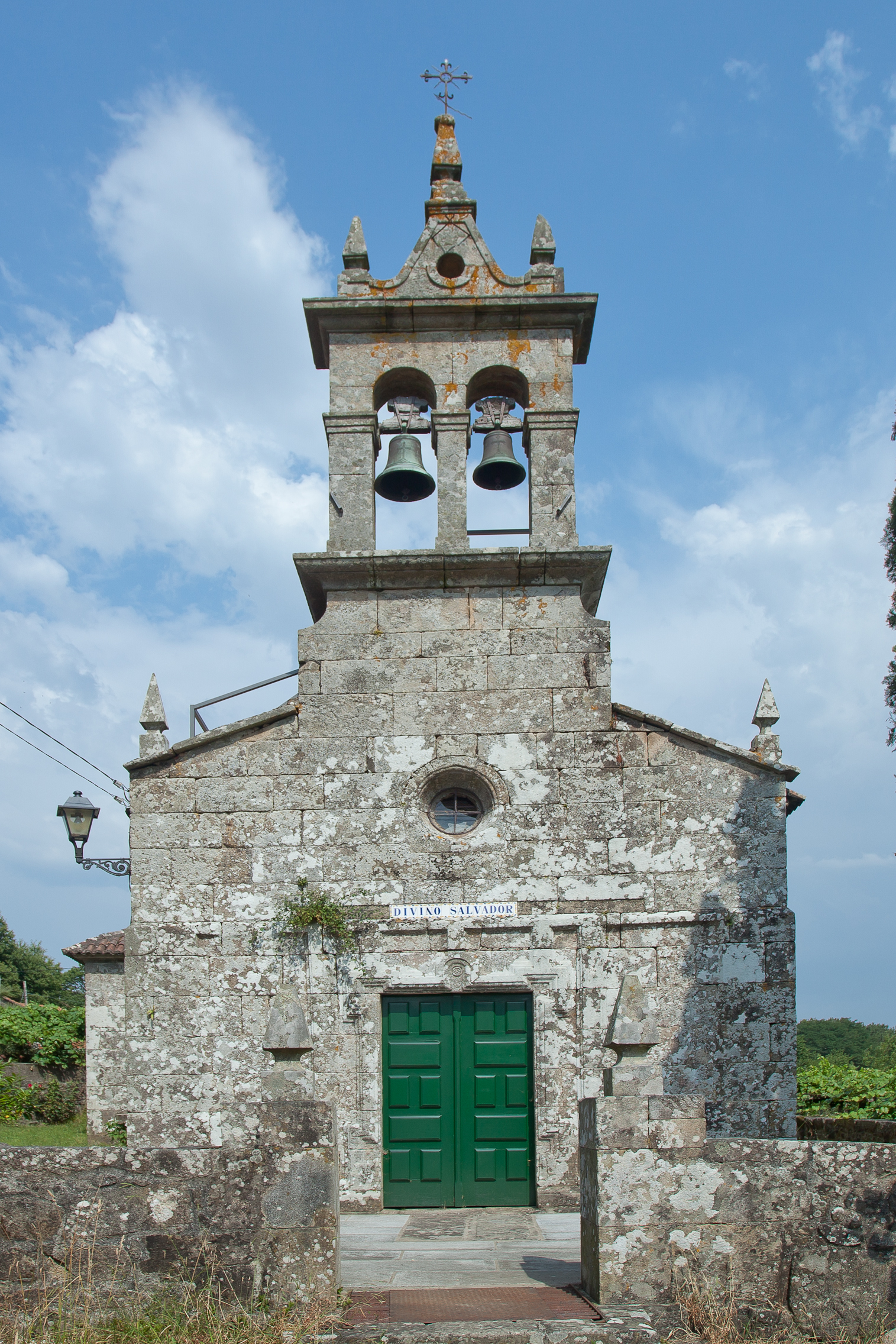 San Salvador de Bastavales, Brión.